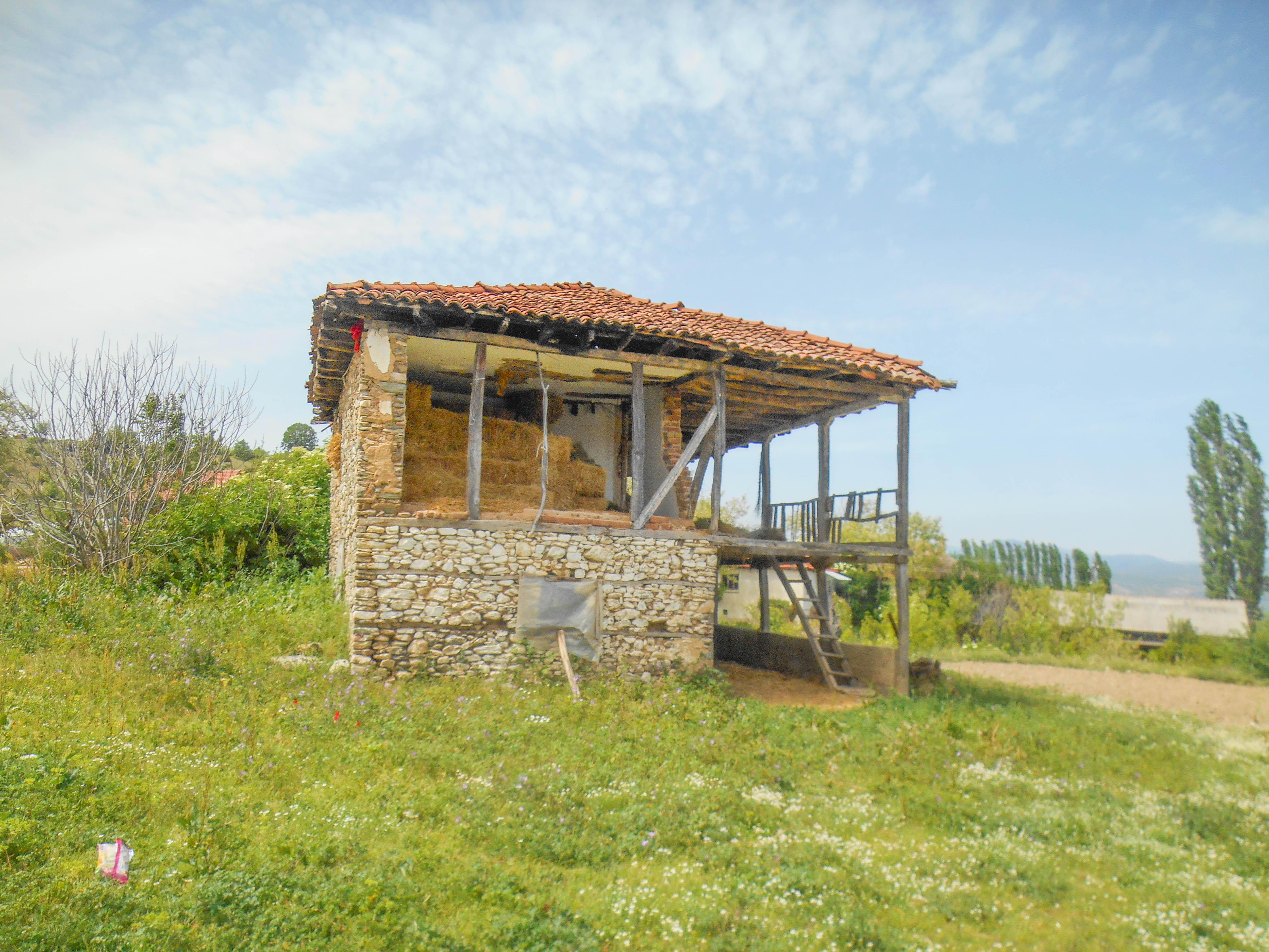 Дукатино